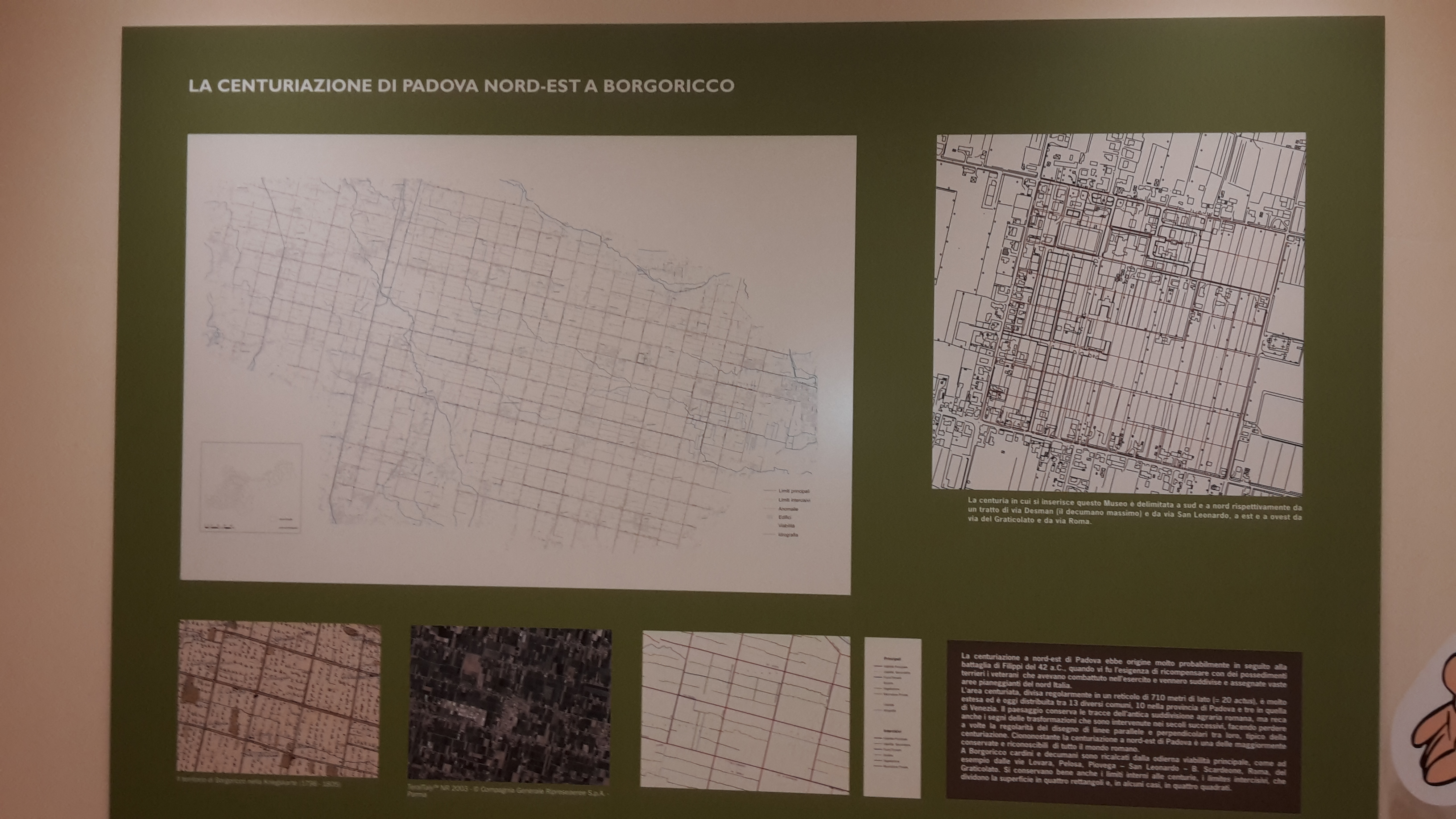 Cartine presenti nel museo